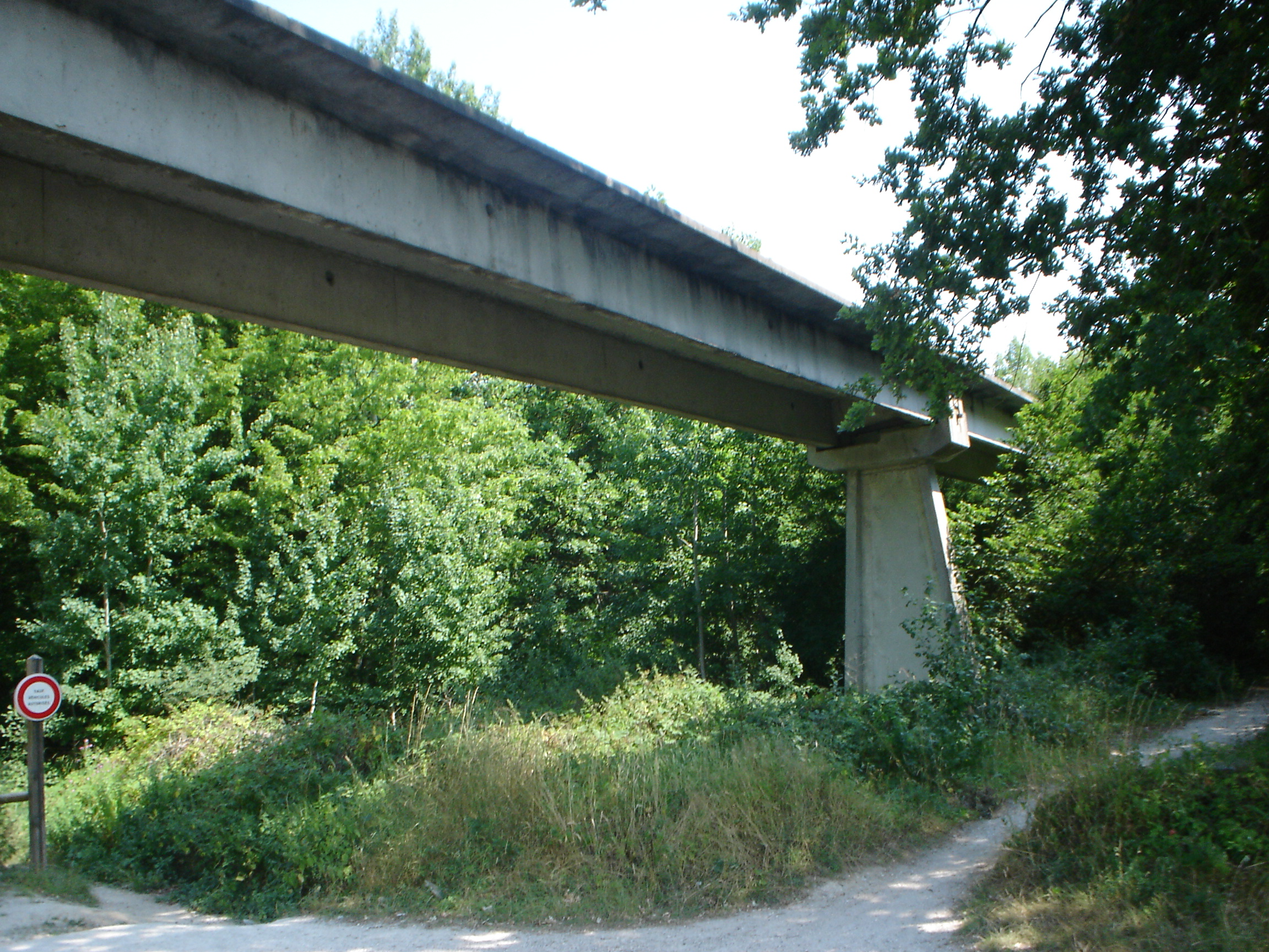 Photo du rail de l'aérotrain à Saran, Loiret, Centre, France